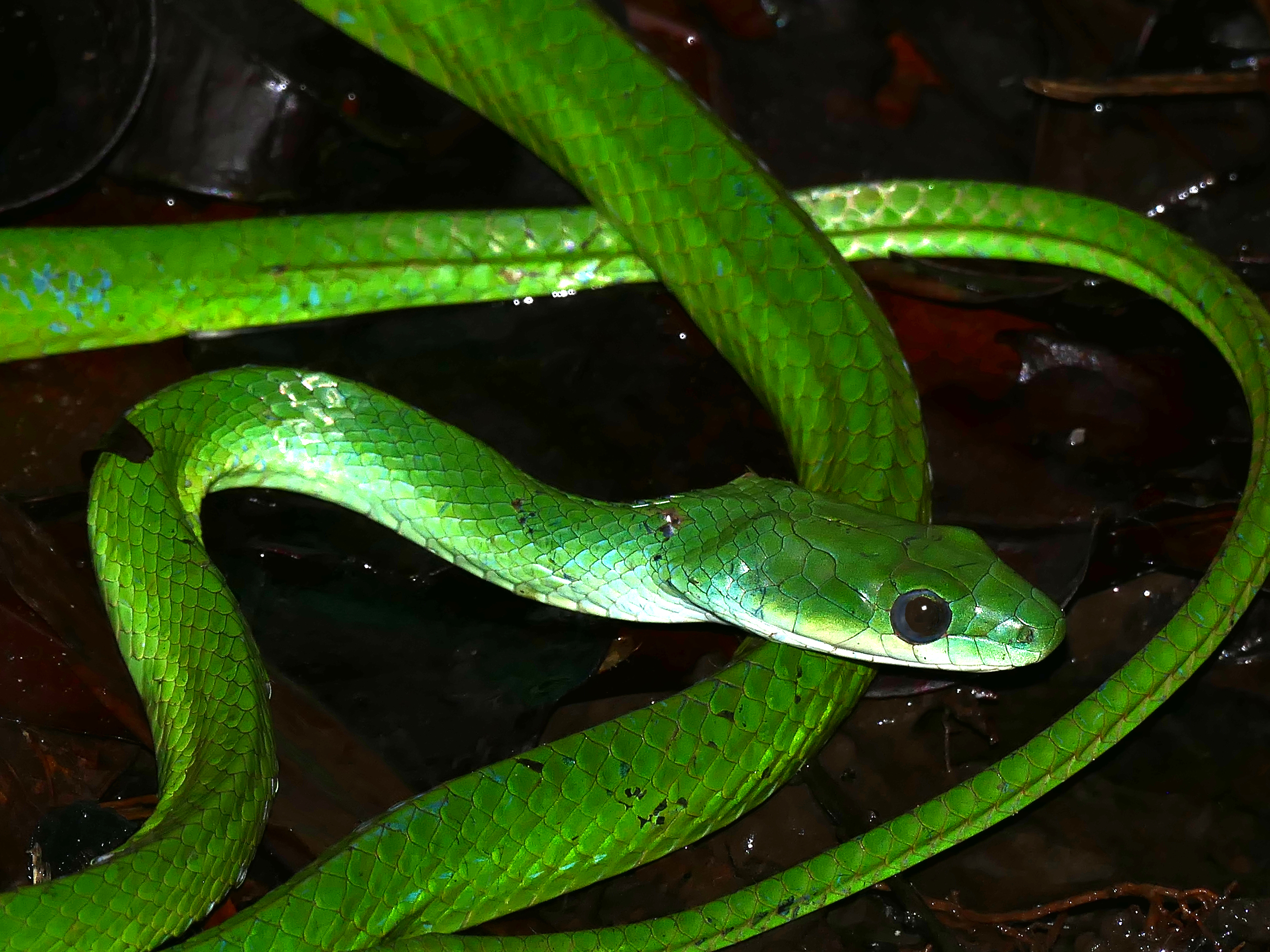 Piste de Bélizon, Roura, French Guyana, FRANCE